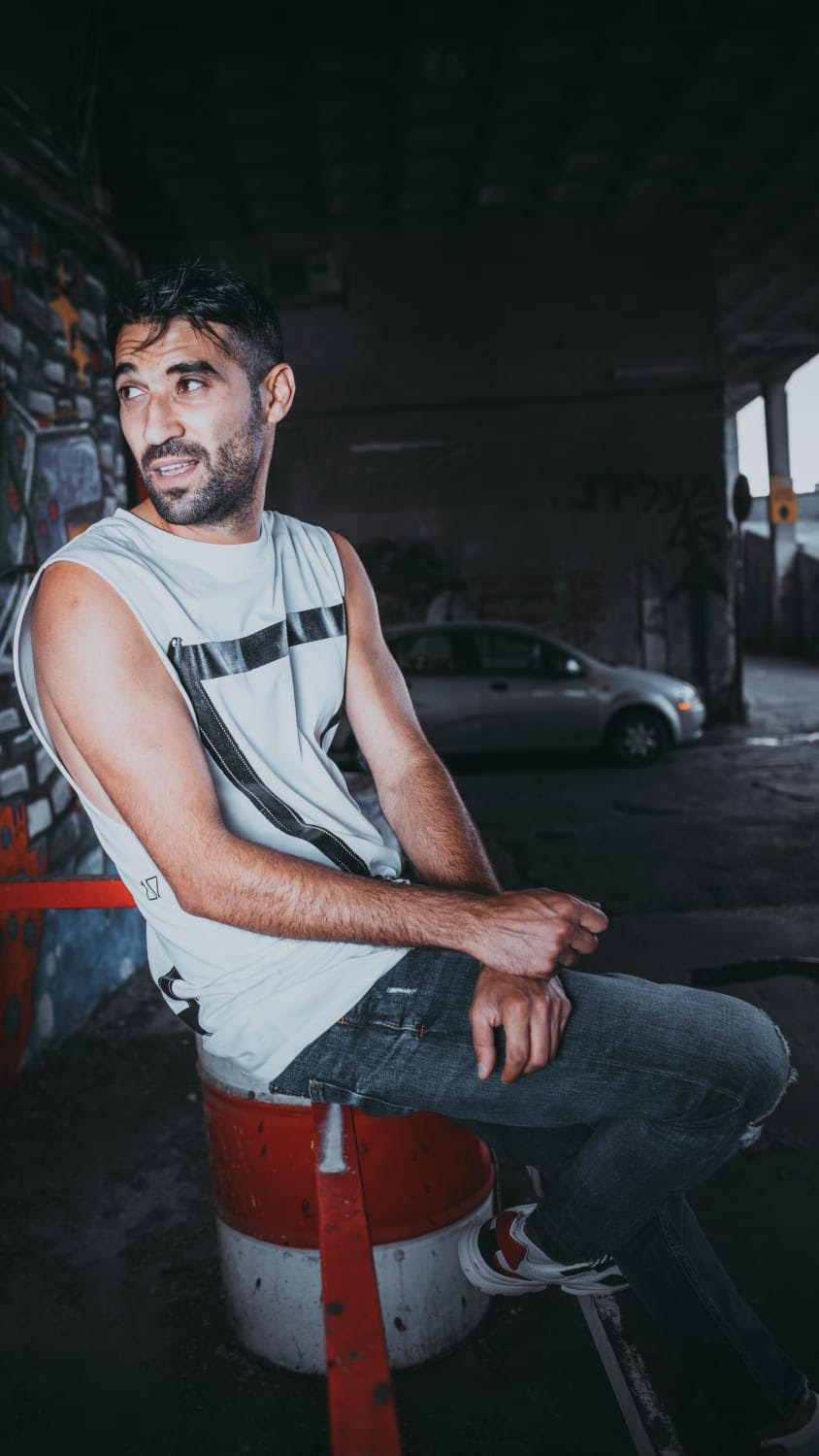 עידן חיים, זמר